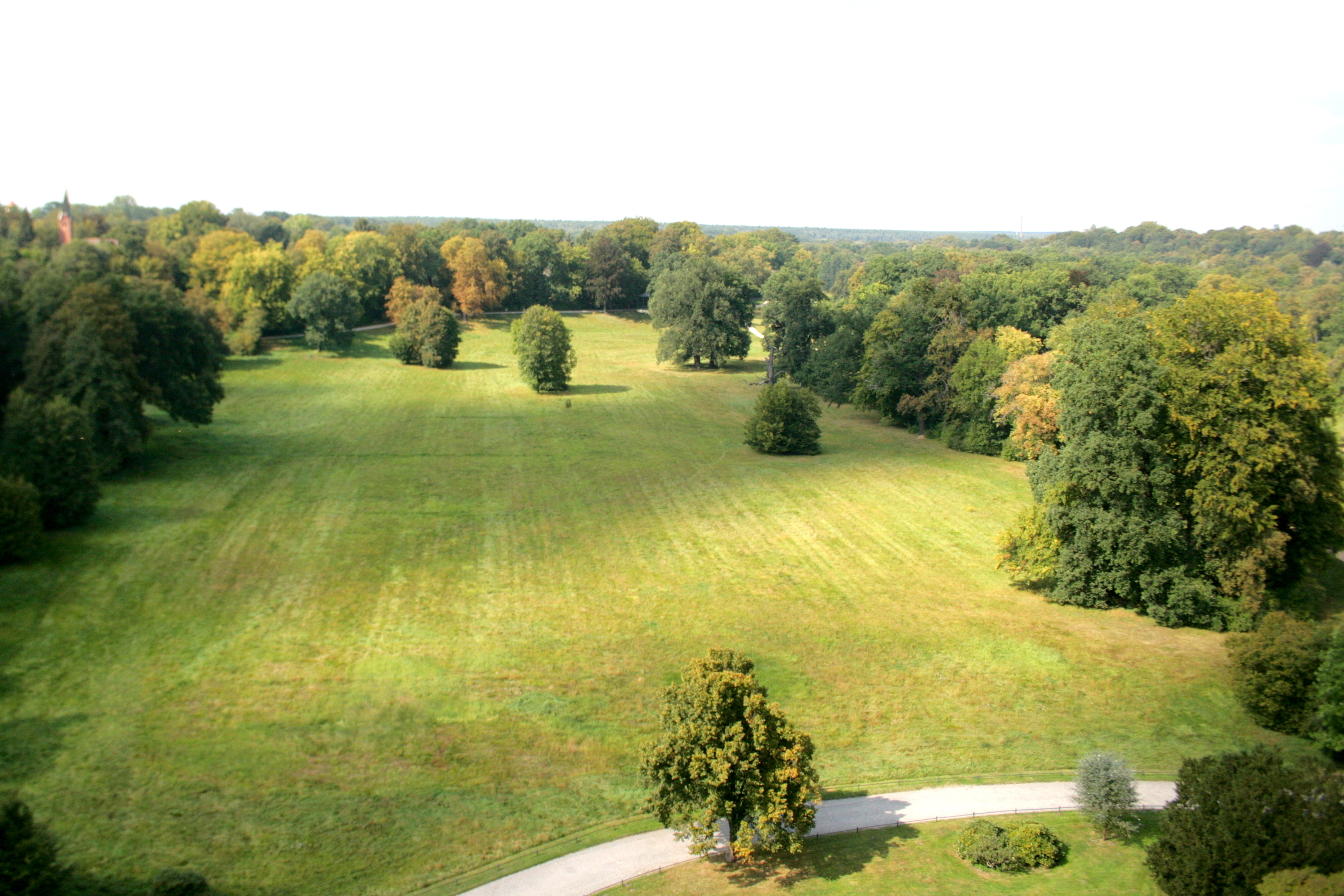 Blick vom Schlossturm des Neuen Schlosses in Bad Muskau